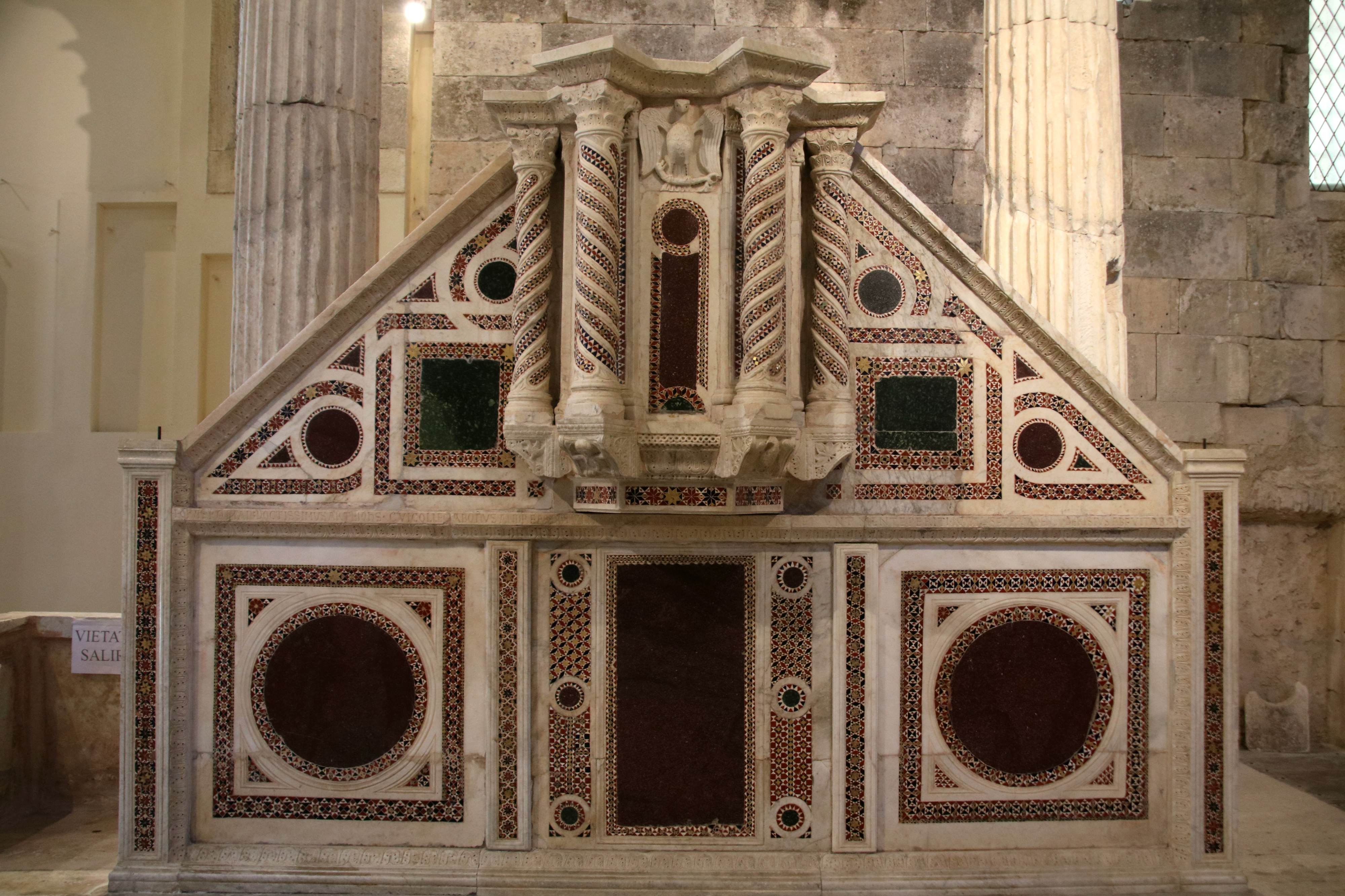 Pulpito, chiesa di San Pietro (Massa d’Albe)